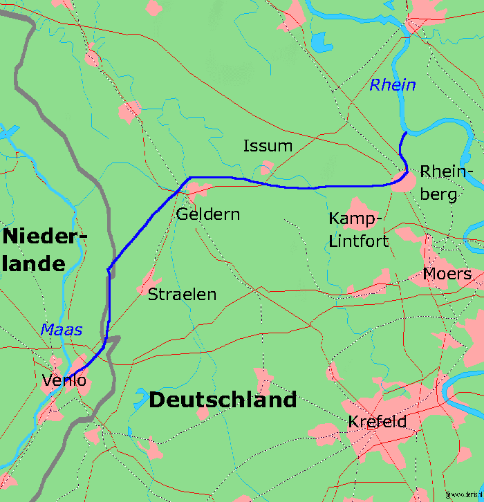 Karte der Fossa Eugeniana, Kartenquelle: [1]